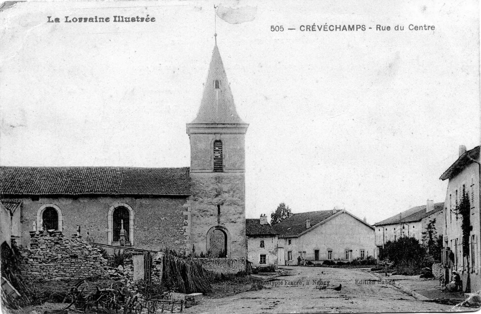 Ortszentrum